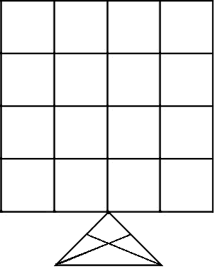 虎棋棋盤的一種。